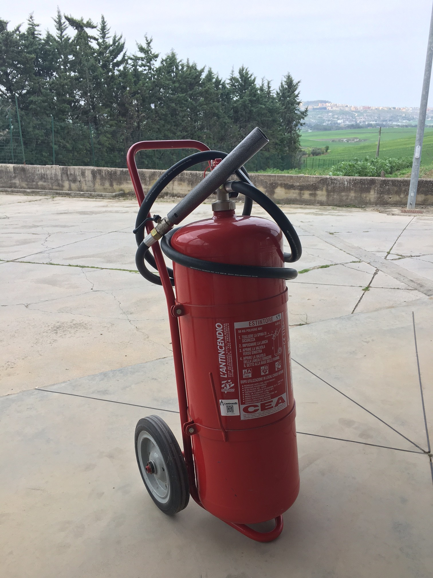 Estintore Carrellato L'Antincendio